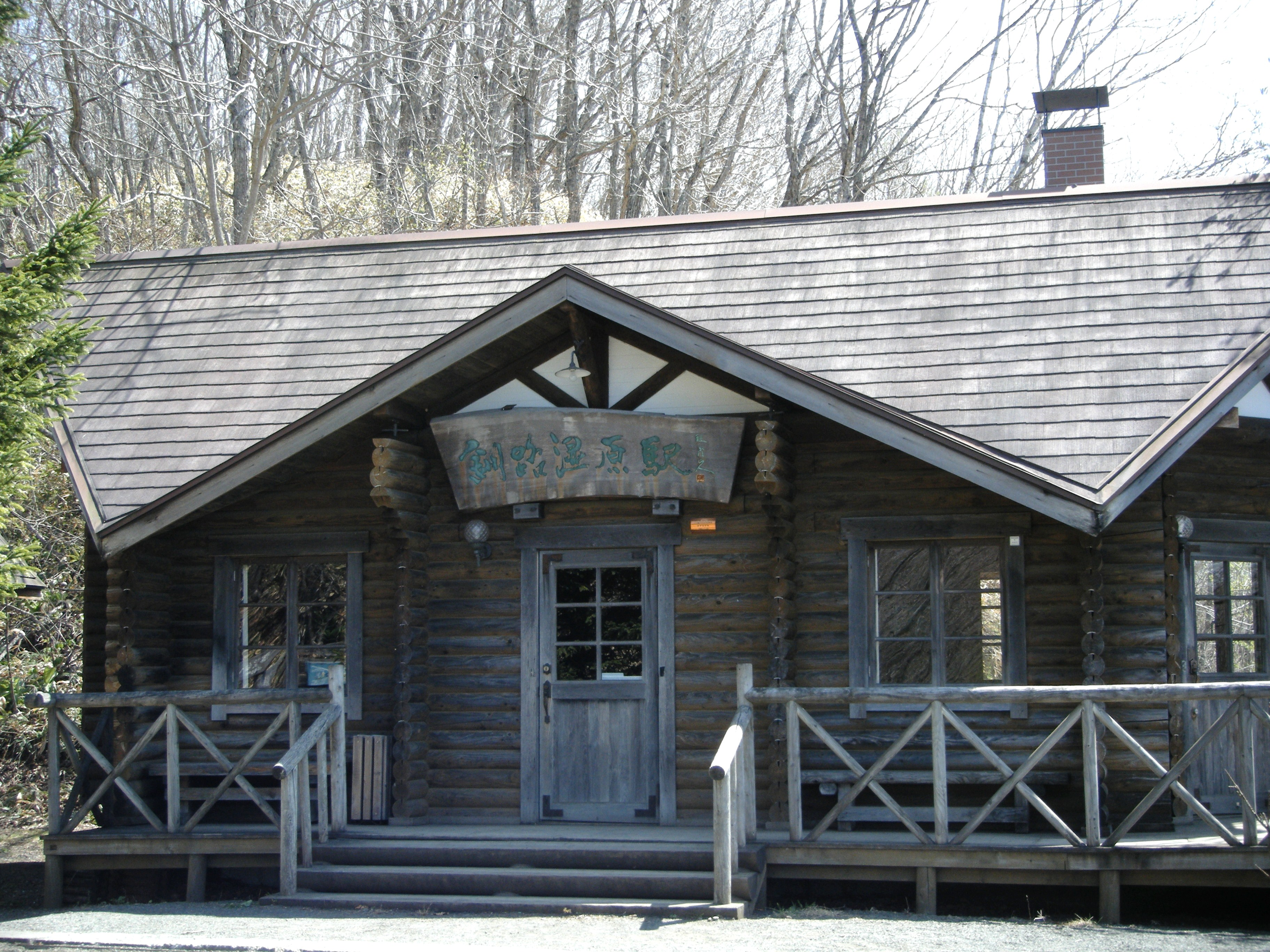 釧路湿原駅舎